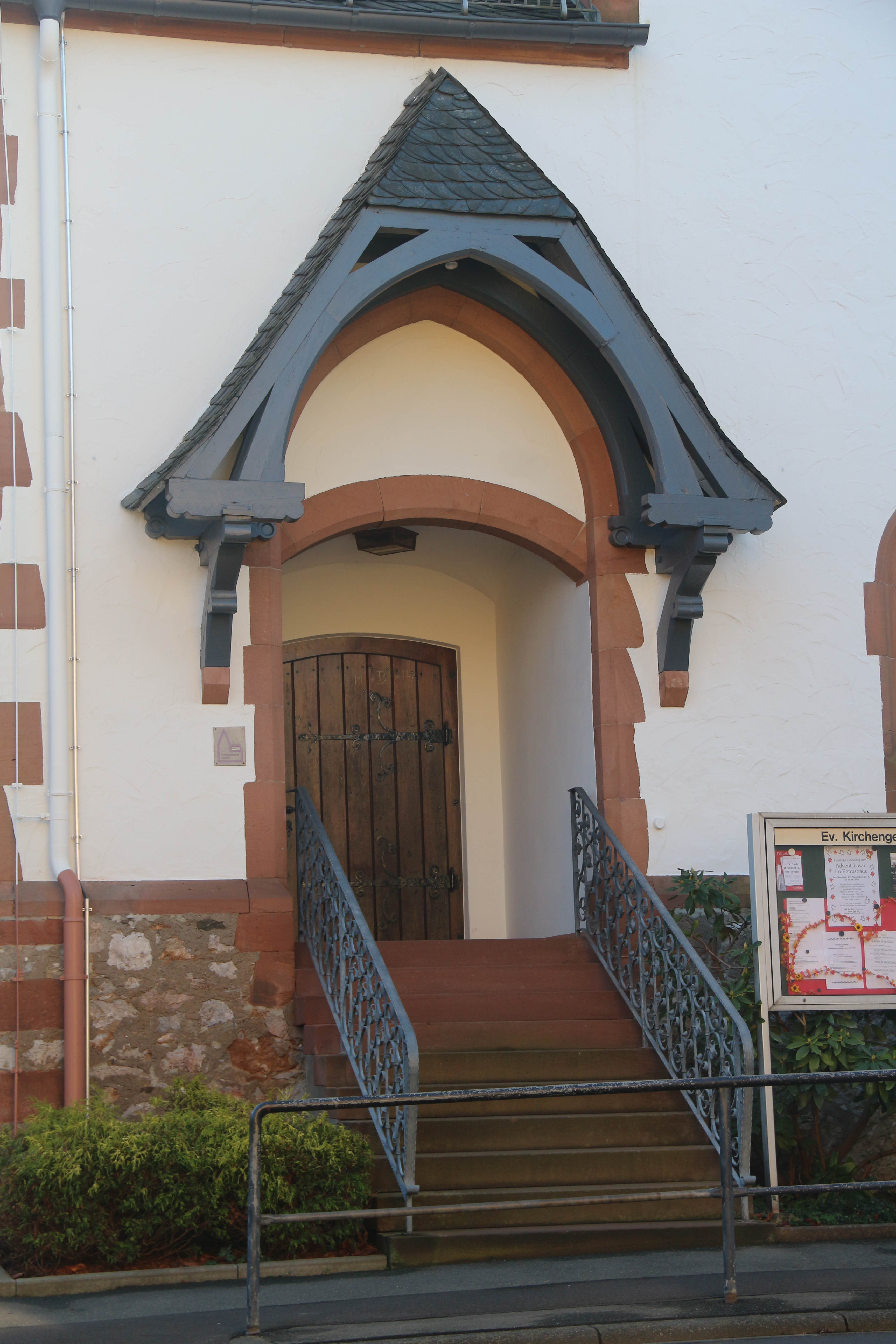 Fellingshausen